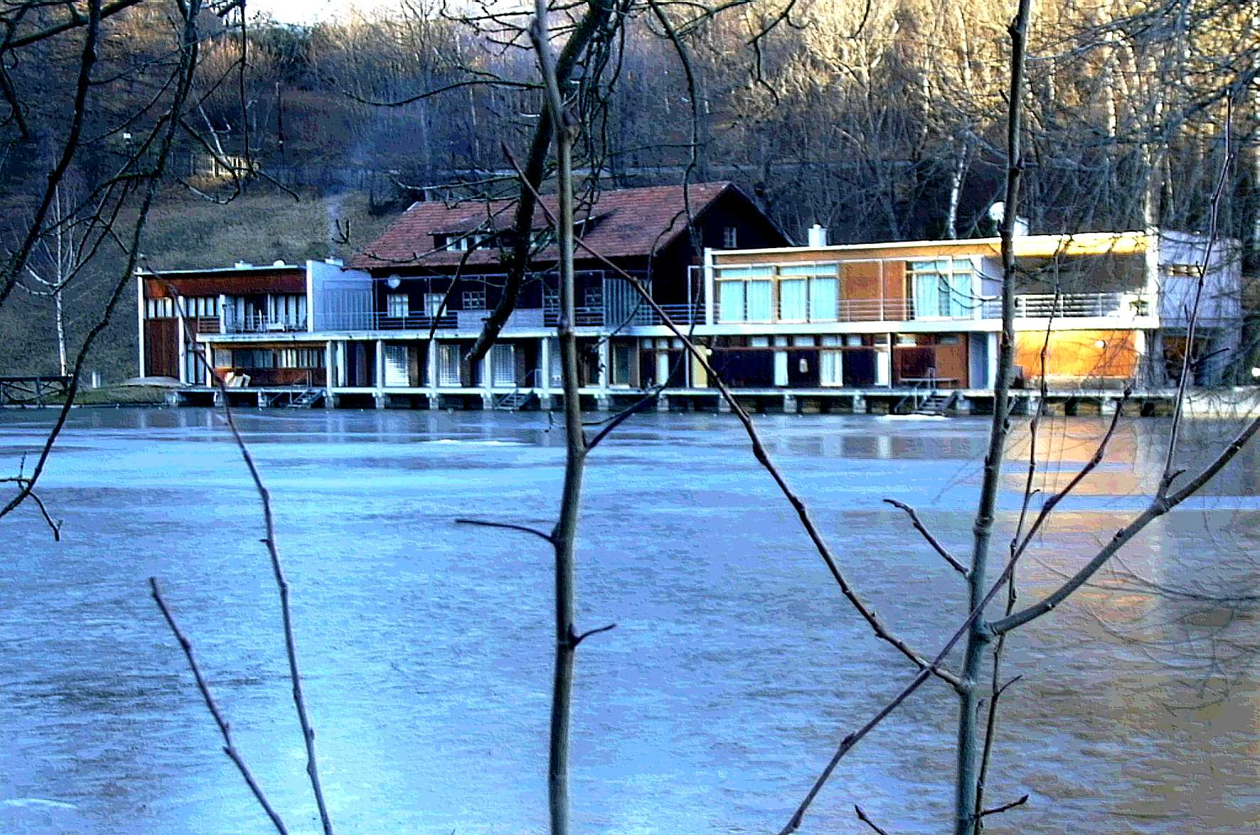 gefrorener Mühlsee Sonneseite